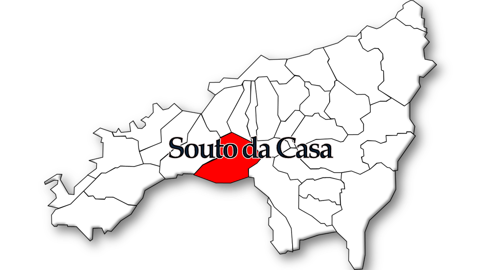 População